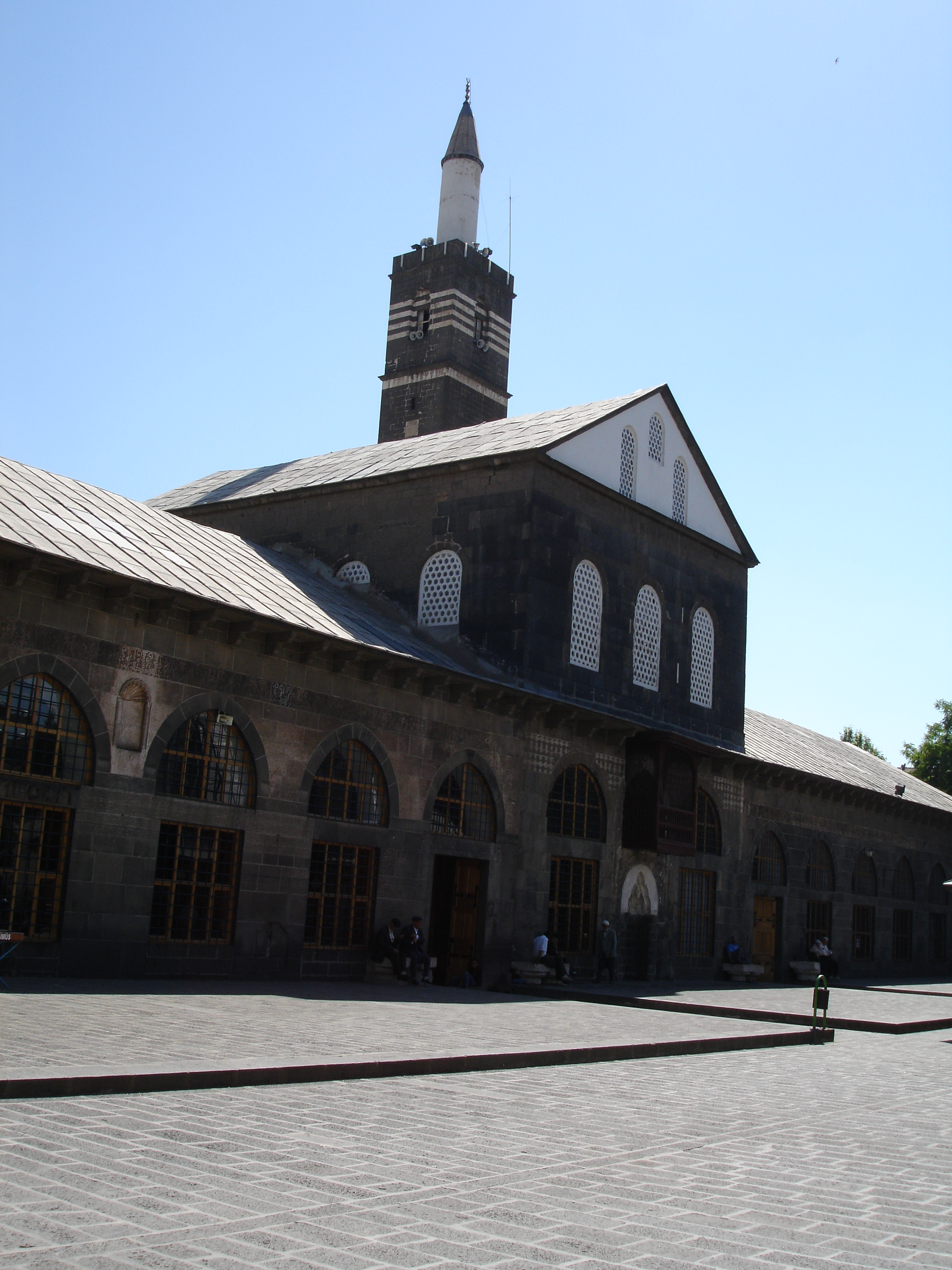 Diyarbakırın tarihi Ulucamisi. Avlusundan bir görüntü